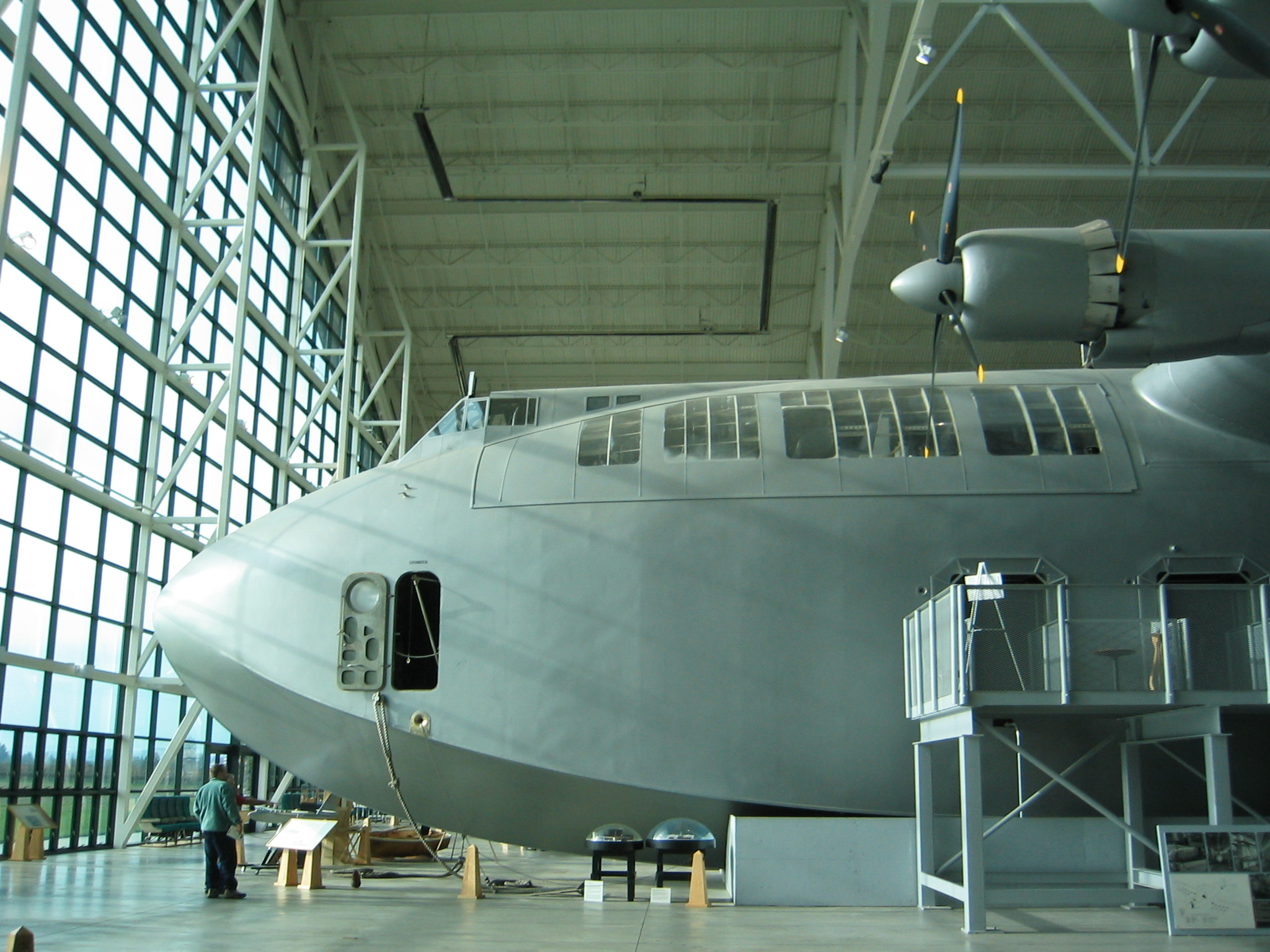 Die neusgedeelte van die H-4.